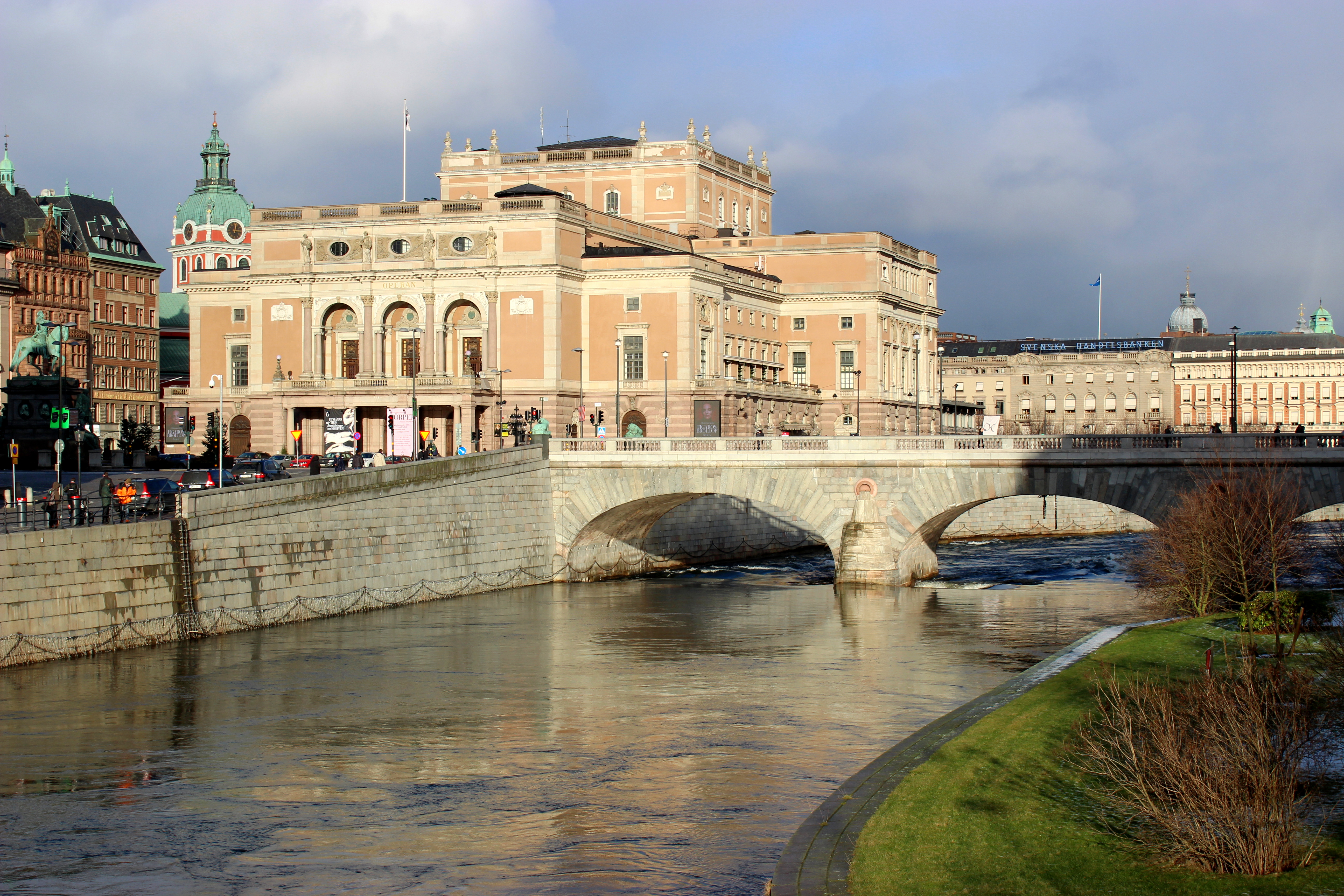 Gamla Stan, Södermalm, Stockholm, Sweden